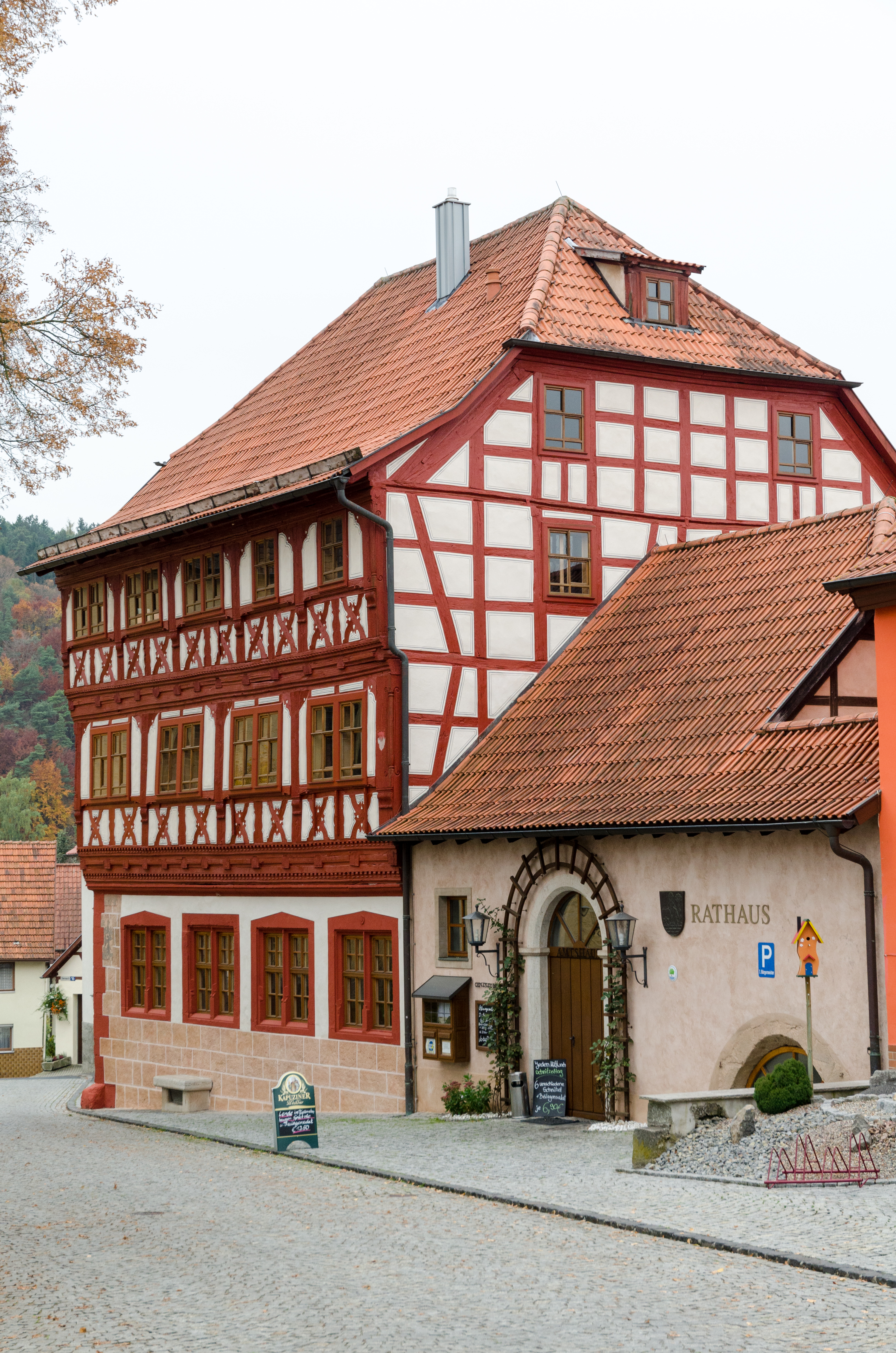 Stockheim, Am Tanzberg 10